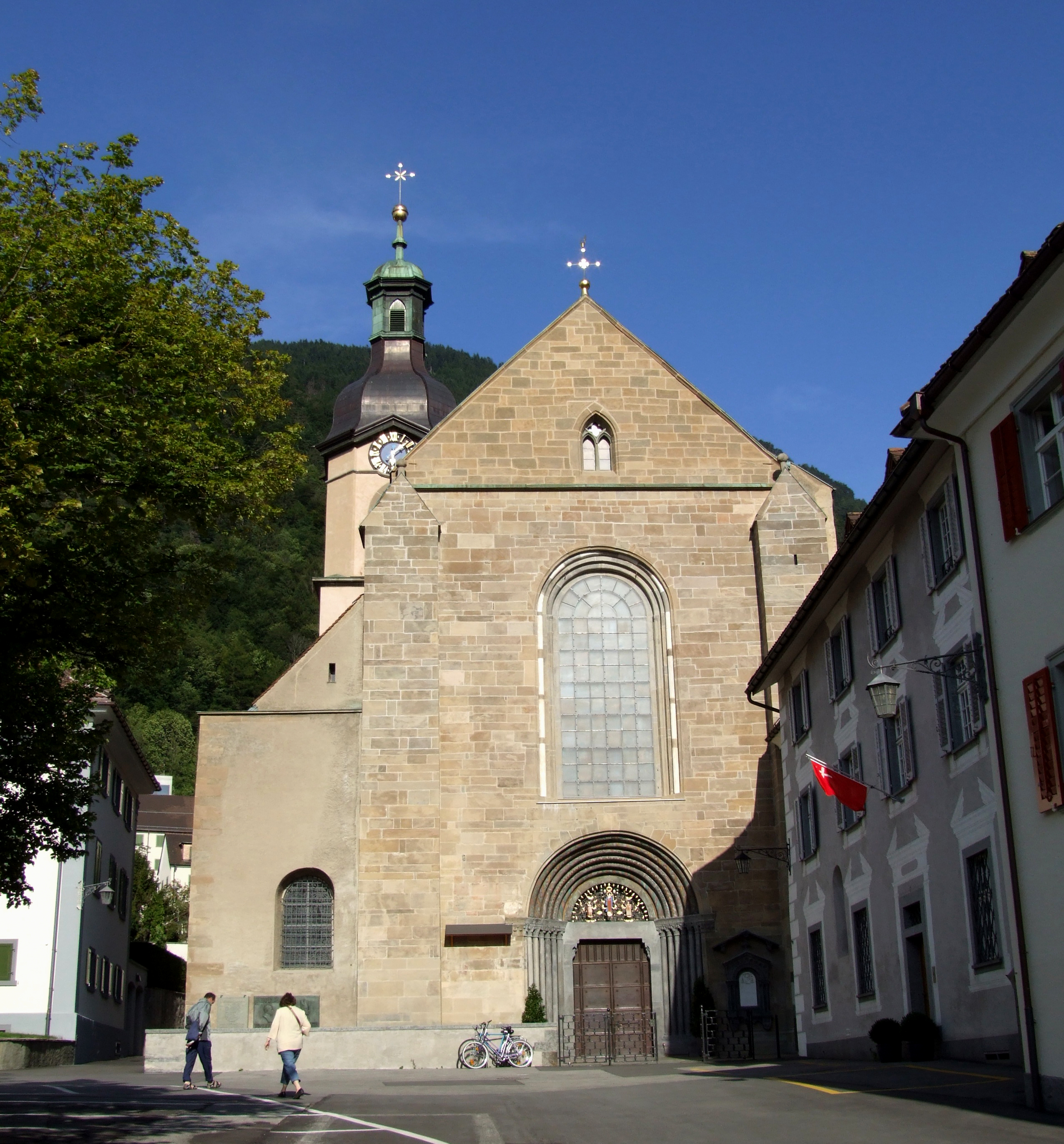 Vorderseite der Kathedrale St. Maria Himmelfahrt, Chur, Graubünden